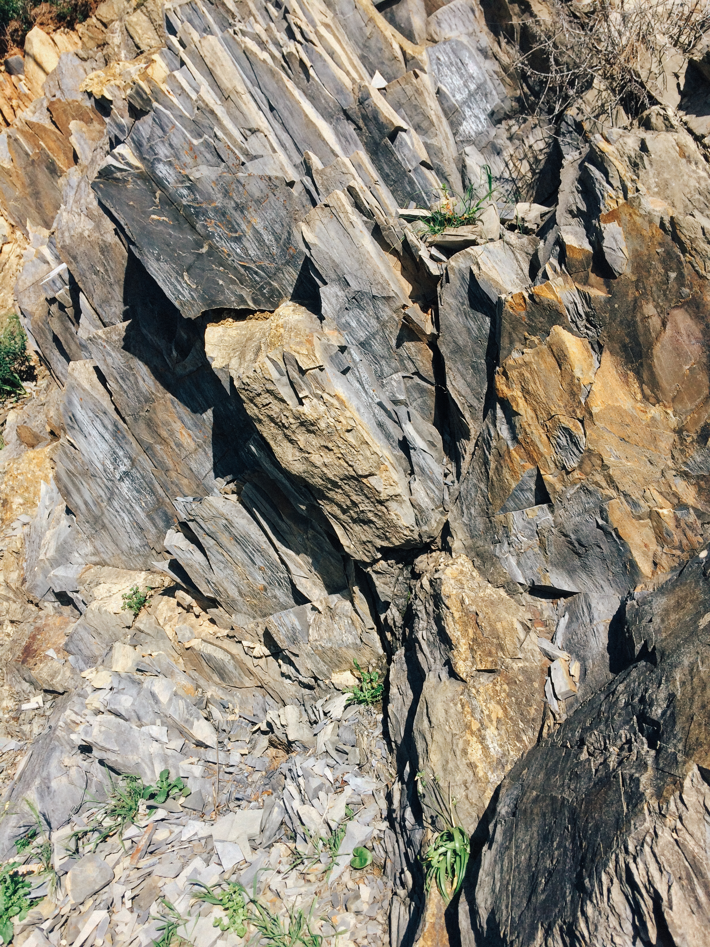 Pormenor